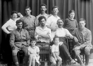 קיילה גלעדי בקצה הימני של שורת העומדים מאחור